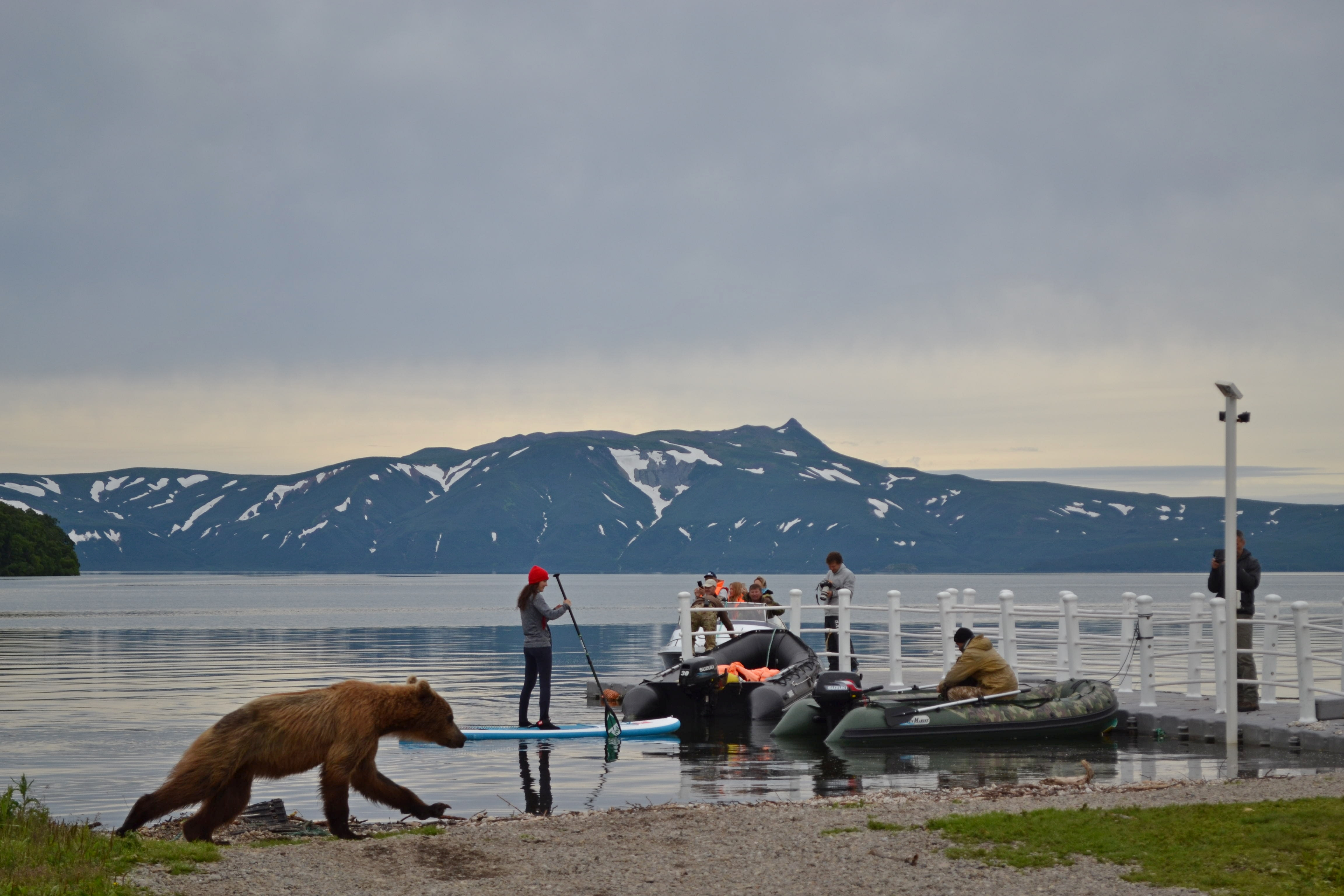 Озеро Курильское: Географические координаты - 51°27’20'‘с.ш., 157°06’00'‘в.д, Усть-Большерецкий район, Камчатский край This image is related to the protected area of Russia number 4110184